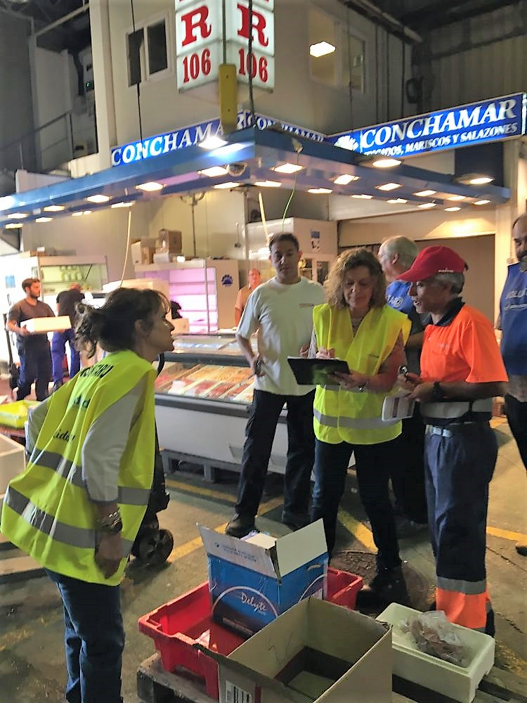 Las empresas mayoristas de Mercamadrid y sus clientes minoristas no han faltado a la cita con la solidaridad de hoy, la Operación Caja, organizada por el Banco de Alimentos de Madrid. Un compromiso que ha dado lugar a la donación de 34.000 kg. de alimentos, superando en un 80% la cifra alcanzada en la jornada celebrada hace un año en el que se computaron 19.000 kg.